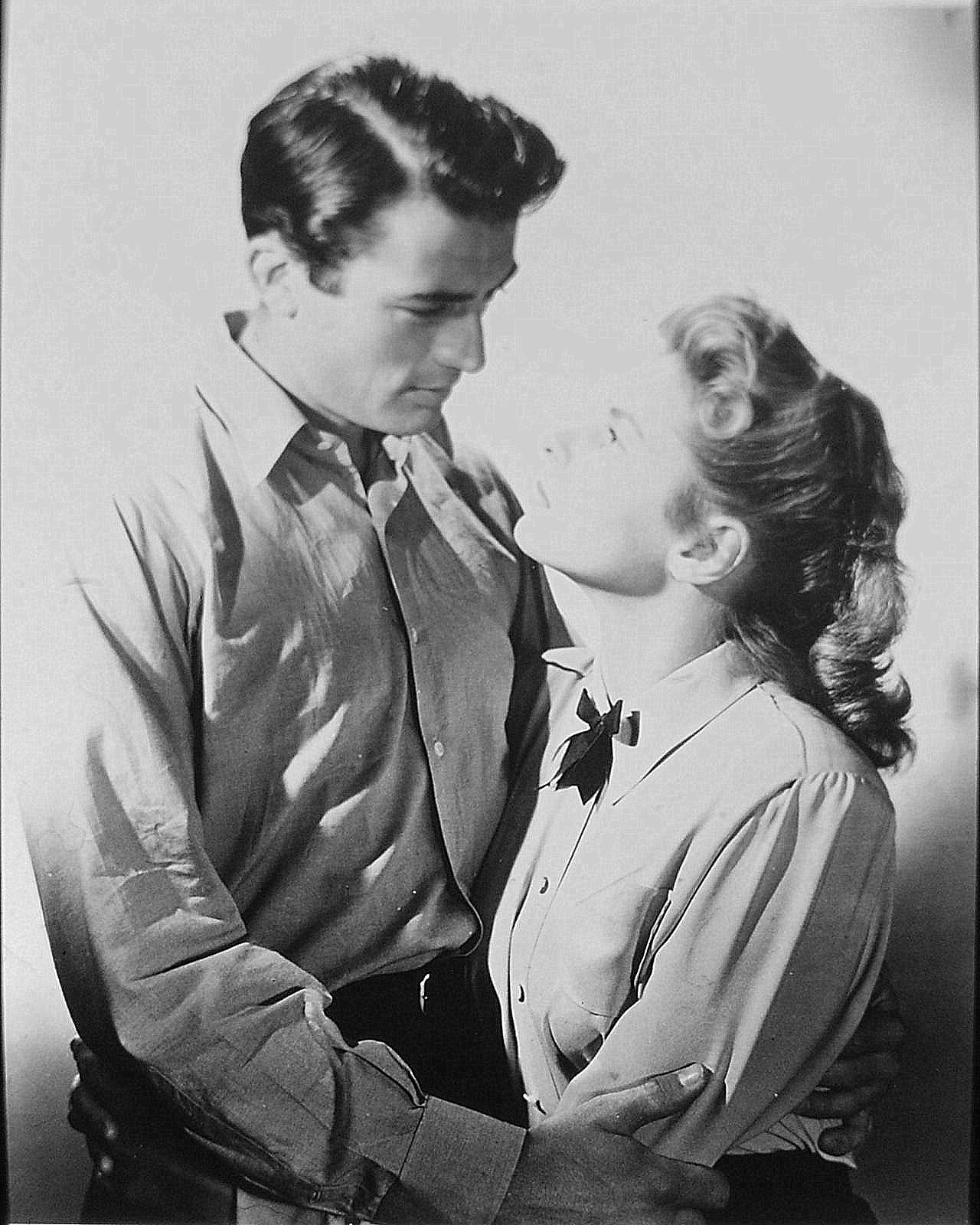 Promotional photo of Gregory Peck and Ingrid Bergman in the American psychological thriller noir film Spellbound (1945).